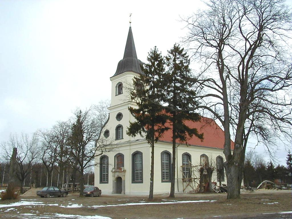 Baltezera baznīca 2000-03-12